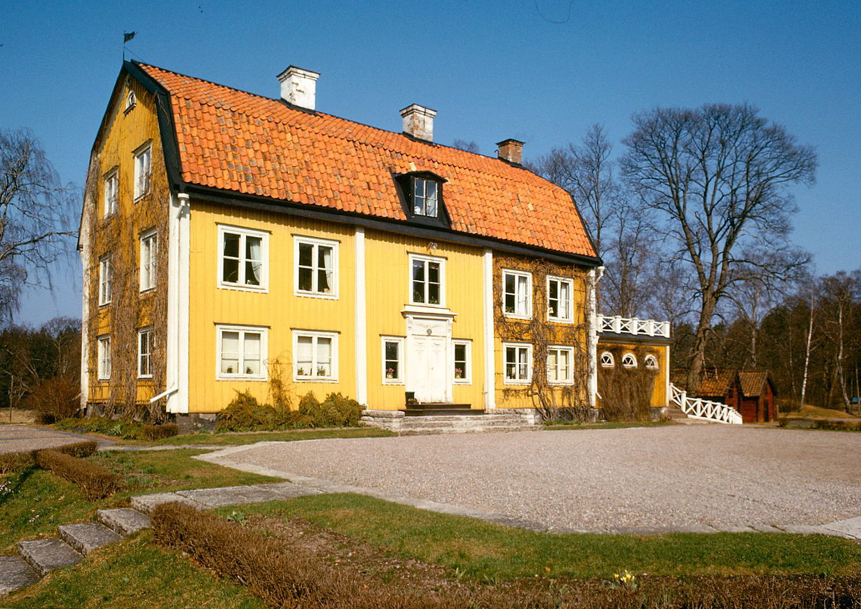 Älvsunda gård, Upplands Väsby